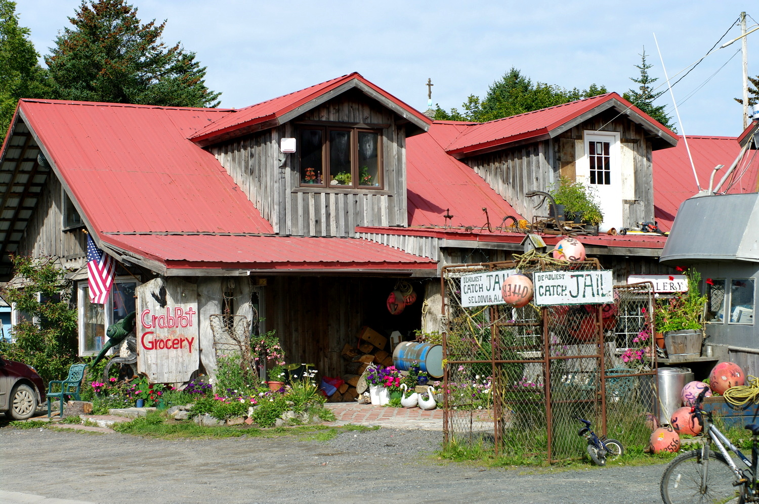 Seldovia, Alaska